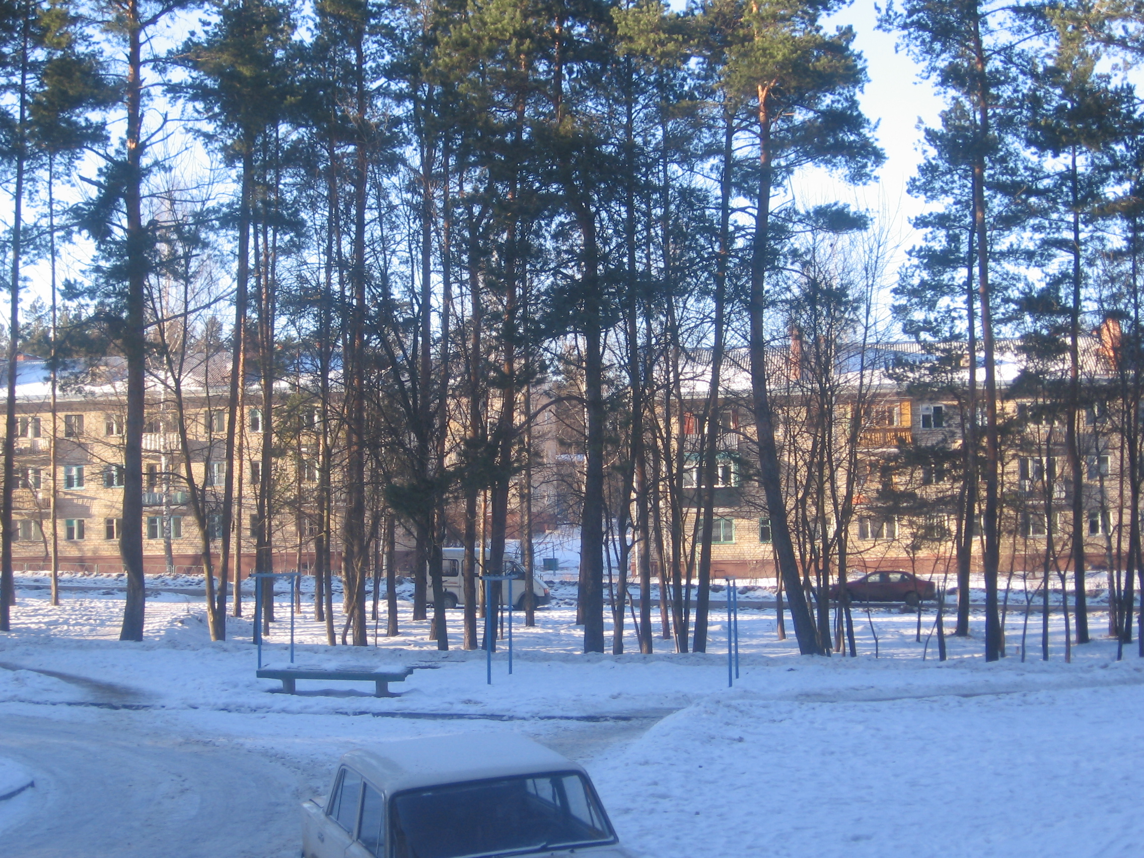 Беларуская (тарашкевіца): Старая частка мікрараёну Сосны.